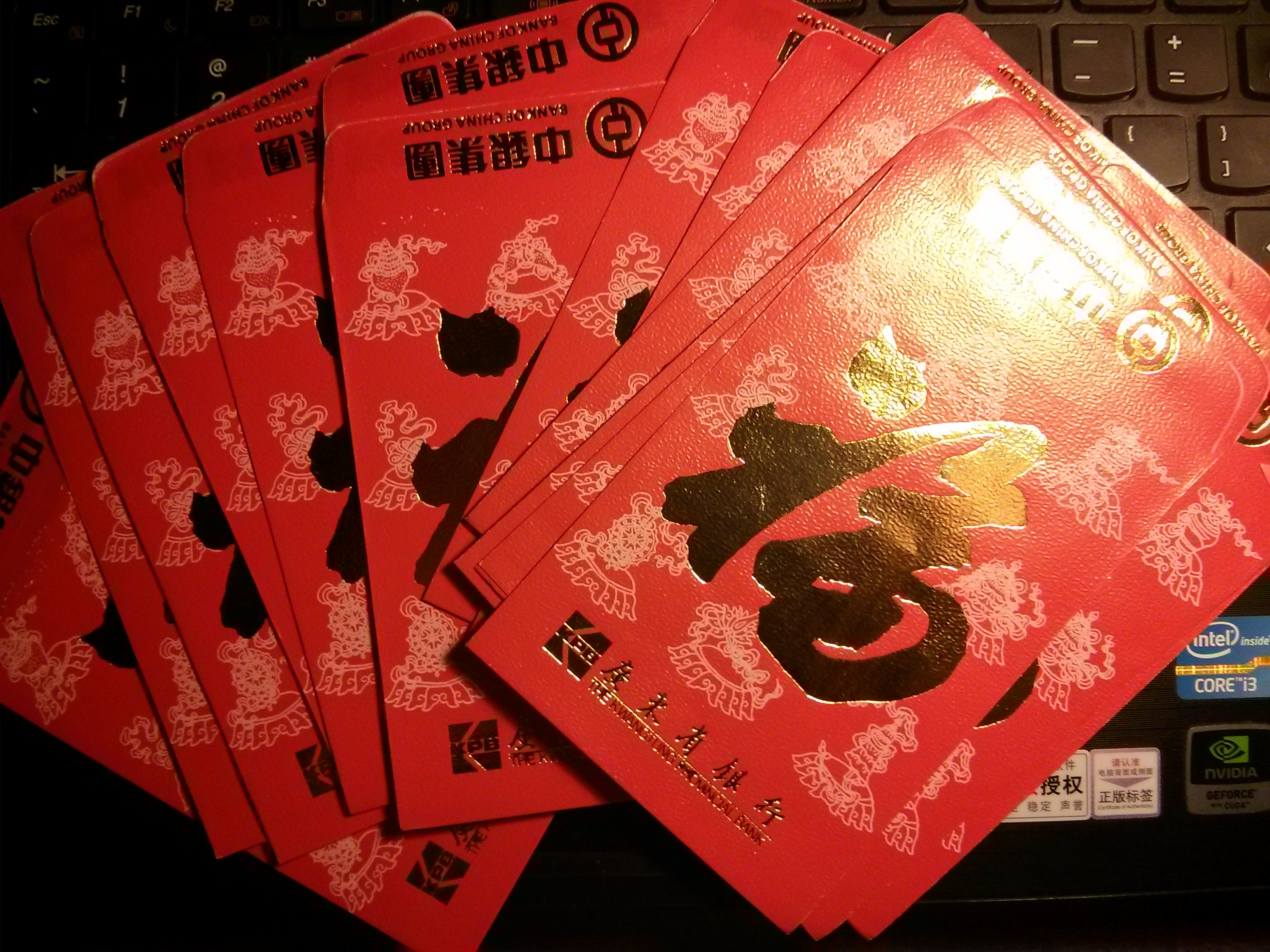 香港中銀集團屬下的廣東省銀行發行的利是封。版權說明：使用本相片必須署名，否則CC協議將失效，並追究相應的法律責任。